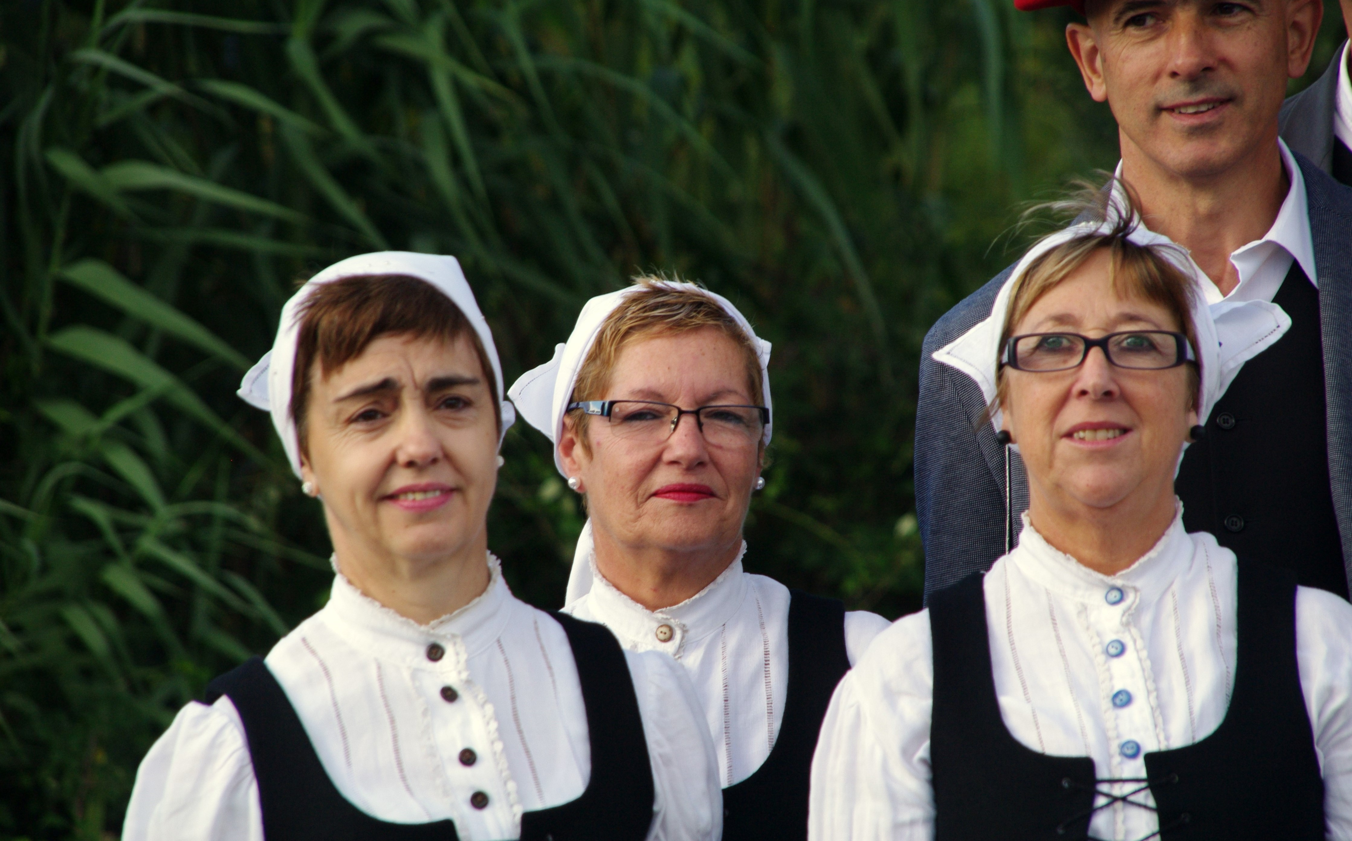 urrijena argazkiak